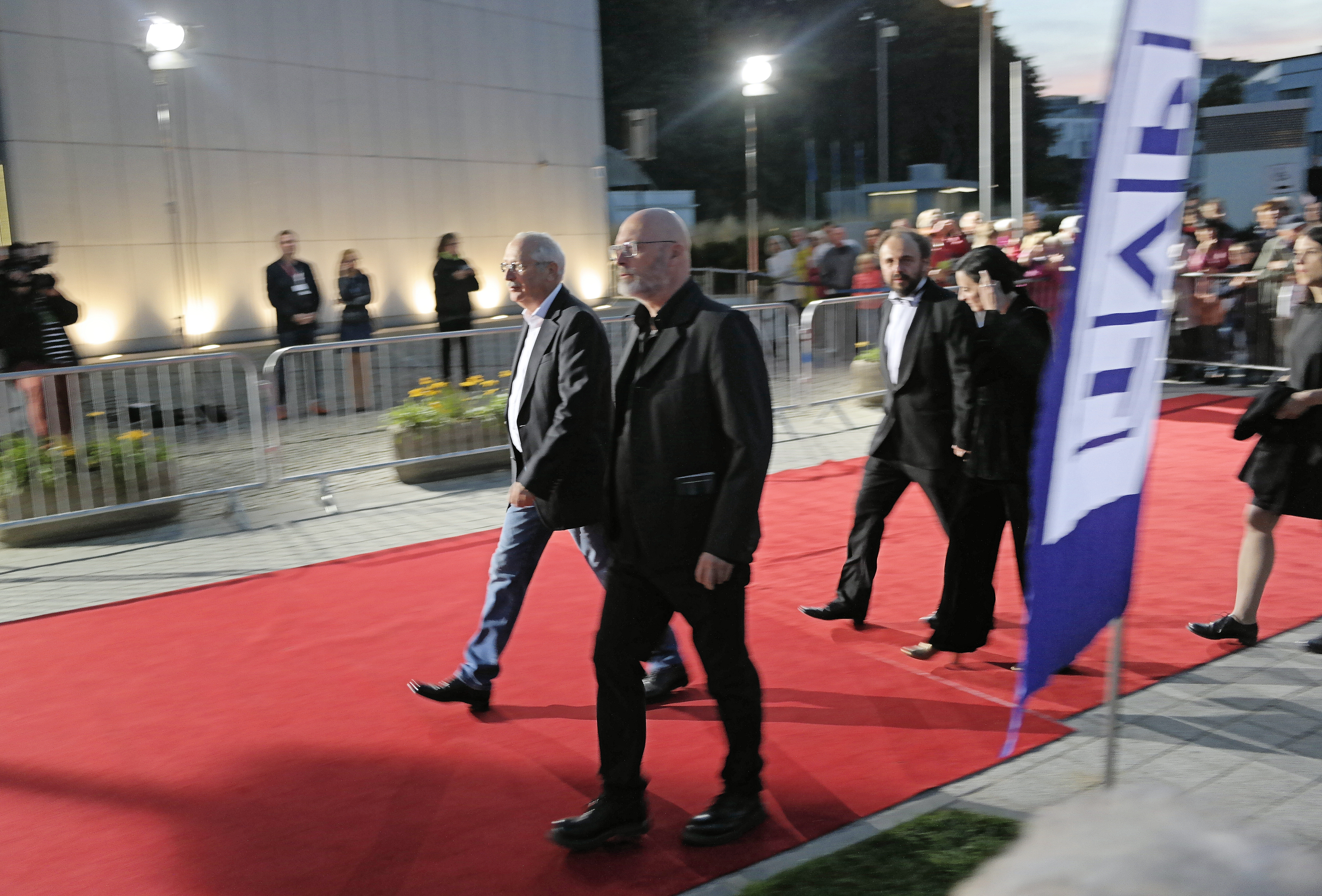 Twórcy filmu "Wołyń", czerwony dywan przed zakończeniem Festiwalu Filmowego w Gdyni 2016